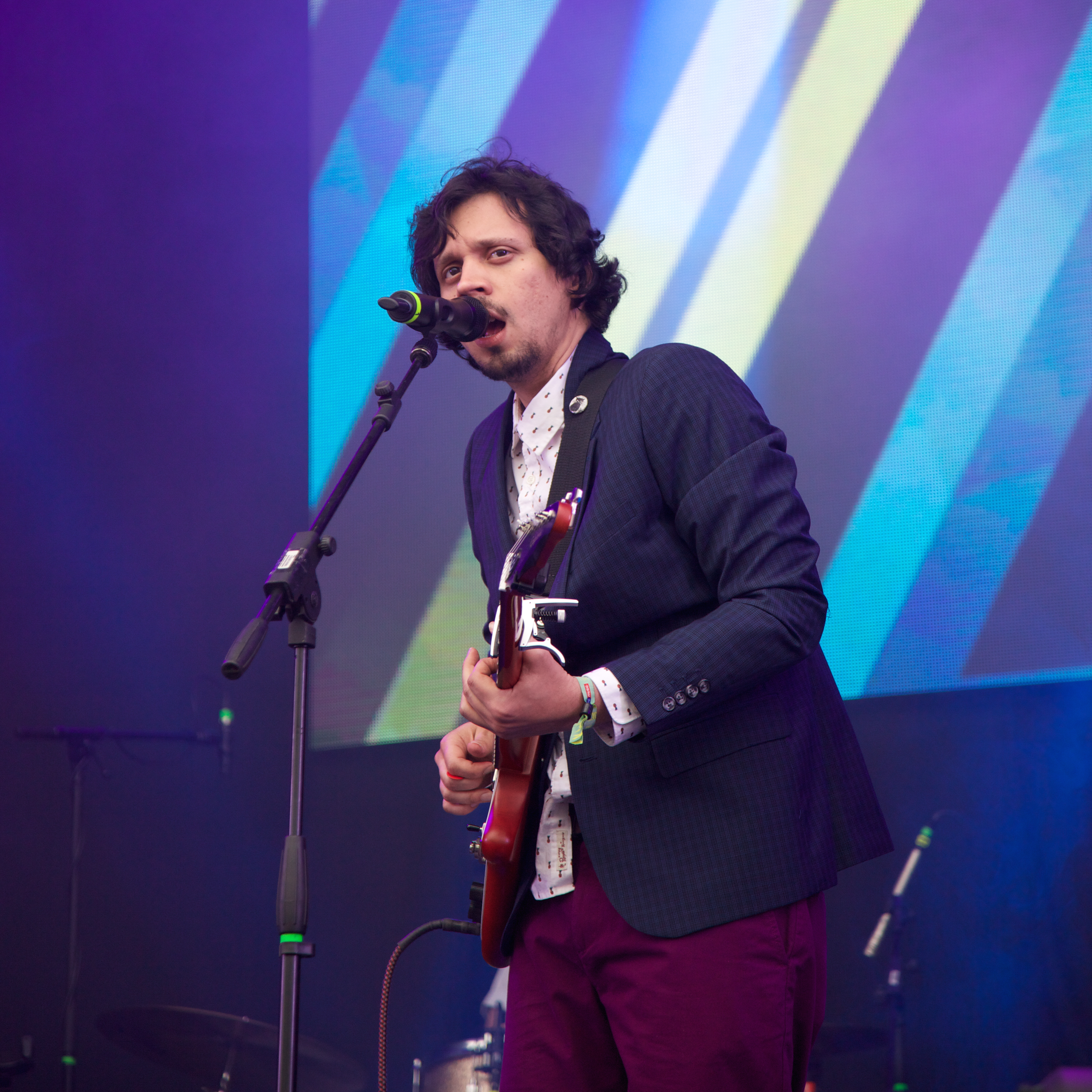 Ulises Hadjis durante su presentación en el Festival Estéreo Picnic 2015